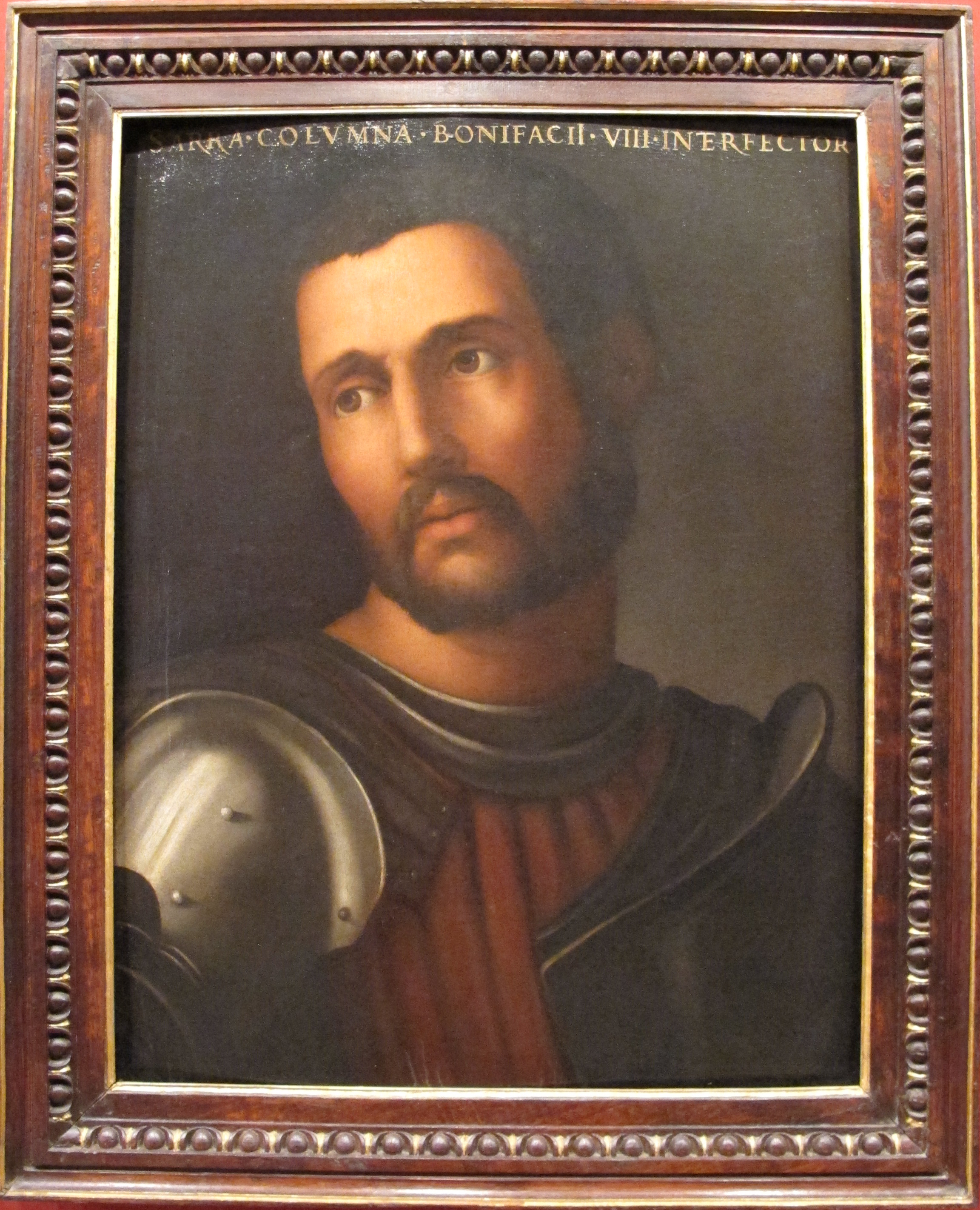 Cristofano dell'altissimo, sciarra colonna, ante 1568